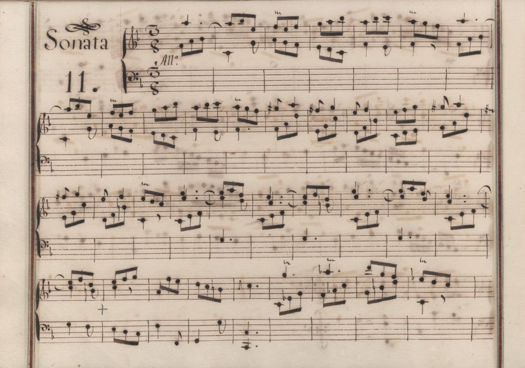 La sonate K. 276, telle qu'elle se présente dans le manuscrit de Venise, volume V no. 11.